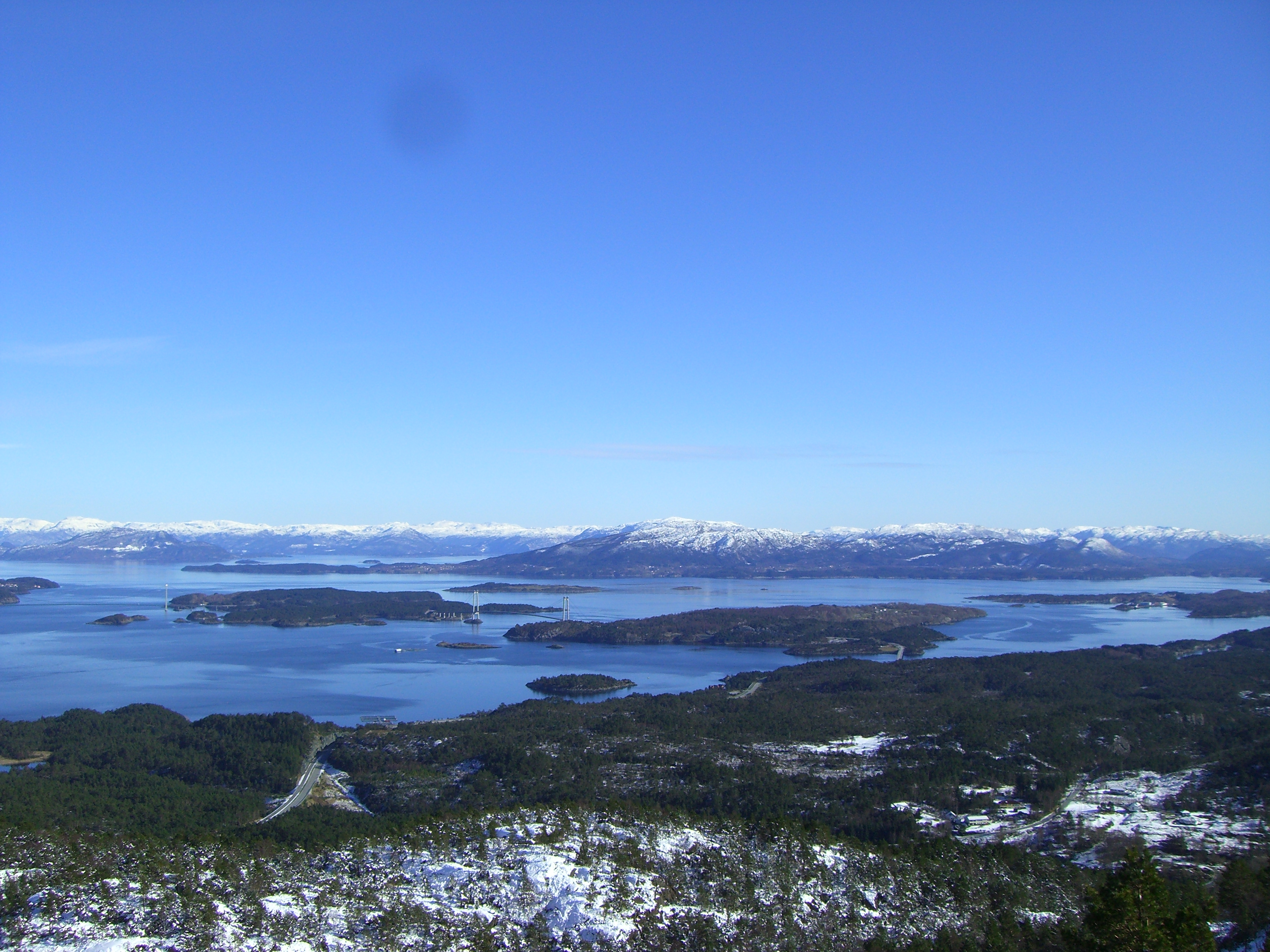 no: Utsikt frå Siggjo. Landet nedst i bilete er øya Bømlo. Vegen ein ser på Bømlo er Riksveg 542. Vegen fortset ut på Spyssøy over lågbrua Spyssøybrua over Gassasundet. Frå Spyssøy går vegen over hengebrua Bømlabrua til Nautøy. Bak Nautøy ligg Føyno. Frå Føyno fortset vegen som Europaveg 39 over Stordabrua til sørspissen av øya Stord. Ei anna grein av vegen fortset frå Føyno i undervasstunnelen Bømlafjordtunnelen til Sveio. Bruene og tunnelen utgjer Trekantsambanet. Fjorden heiter Sagvågfjorden til venstre for Gassasundet, og Bømlafjorden til høgre for Gassasundet og austom og sørom øyene.